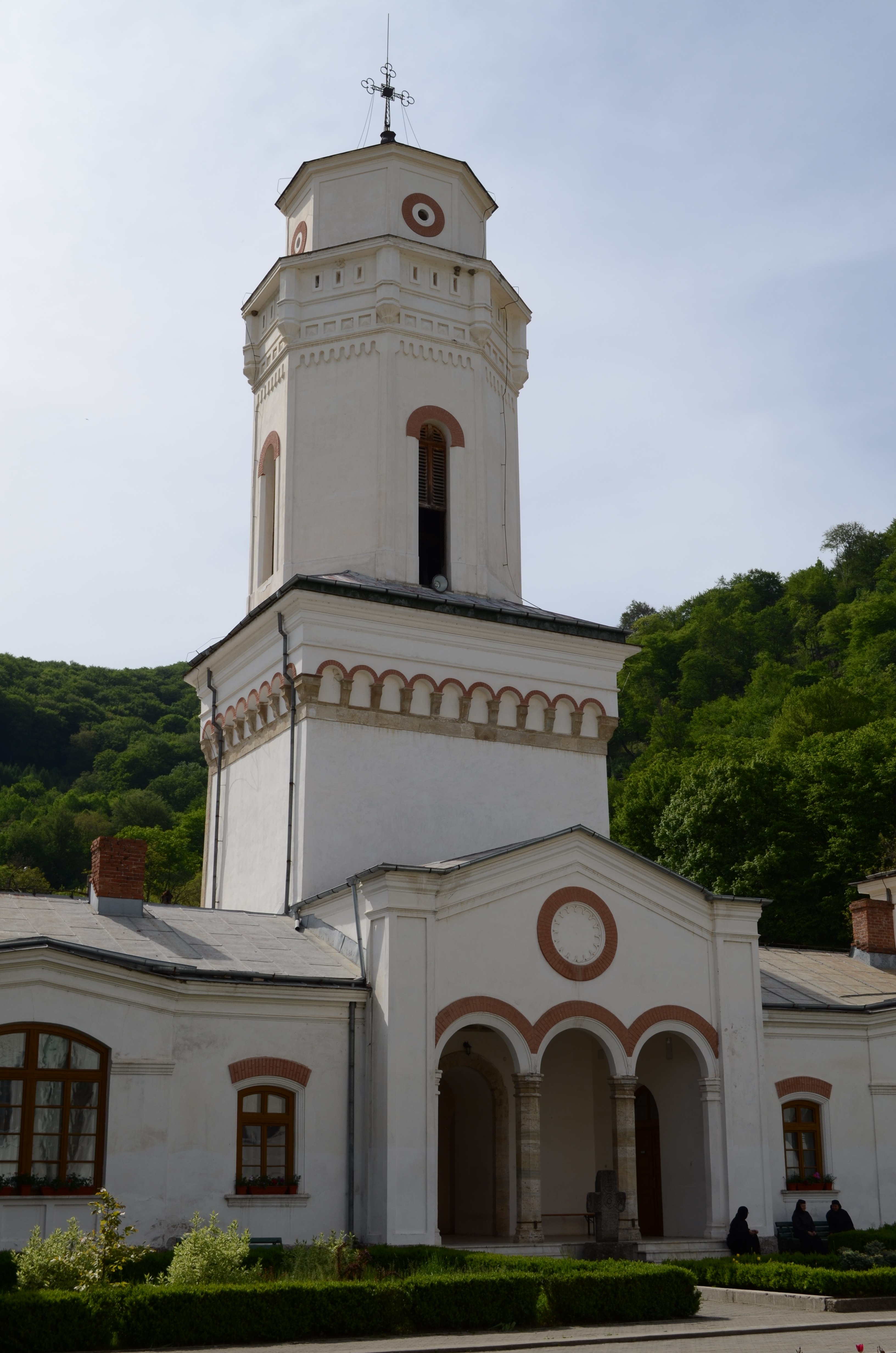 Turn-clopotniță, Mănăstirea Bistrița, județul Vâlcea 03